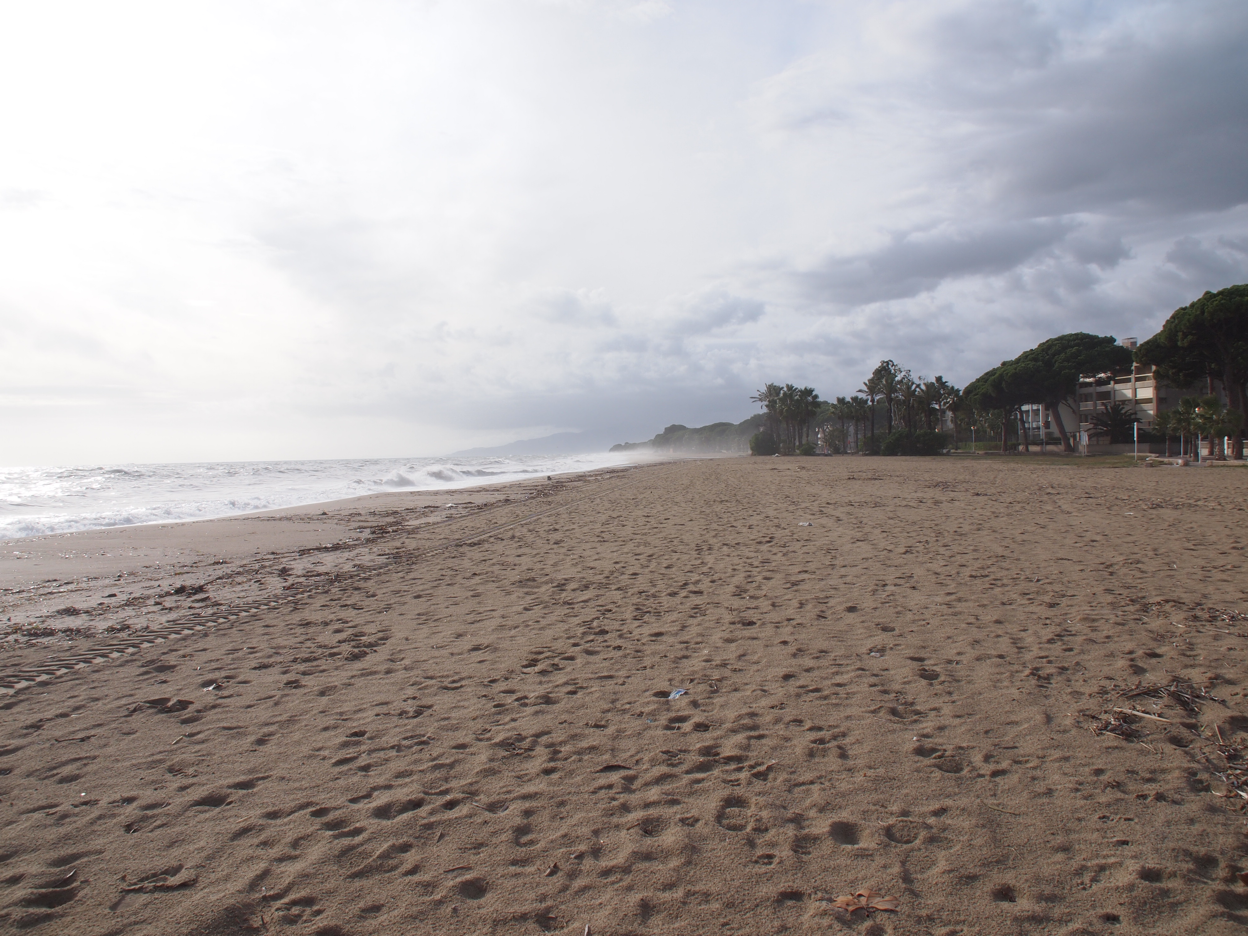 Platja de Vilafortuny (Cambrils)